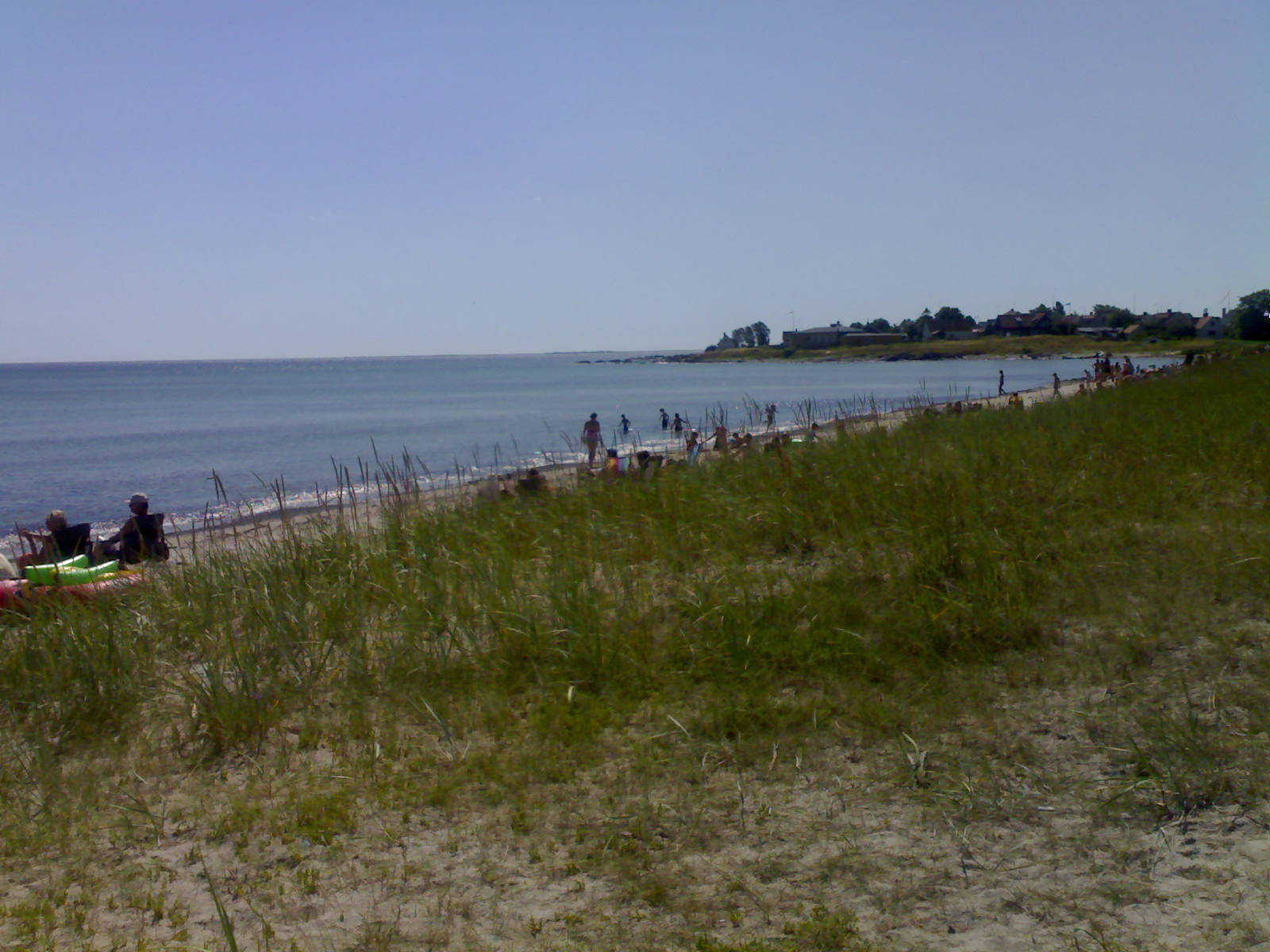 Ljugarn